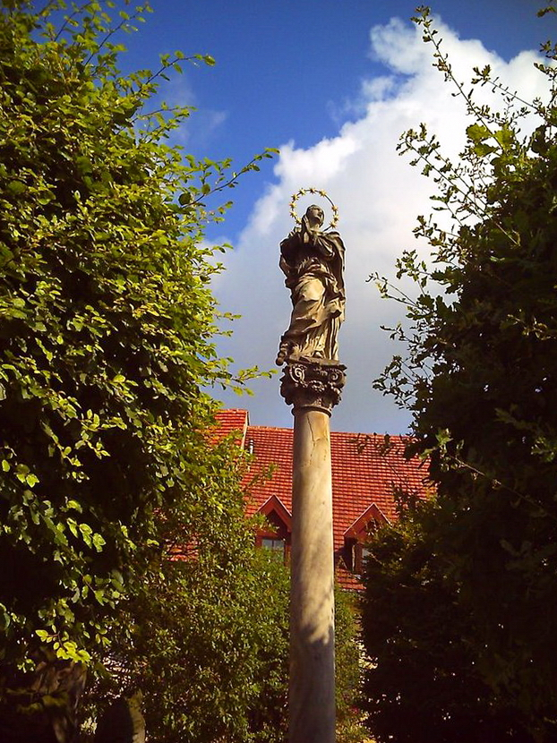 Kolumna maryjna na rynku w Lubomierzu na Dolnym Śląsku, powstała w latach 1730 - 1736.